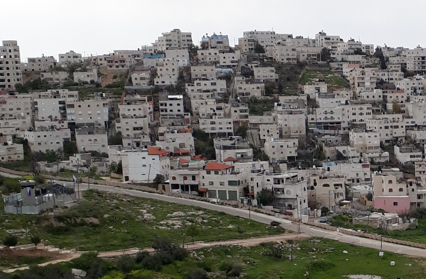 ציר המתפללים מקריית ארבע (שמאל - צפון) לחברון (ימין - דרום מערב) - סימטת המוות במרכז ימין לכיוון מעלה - דרומה, ליד הבית הוורוד